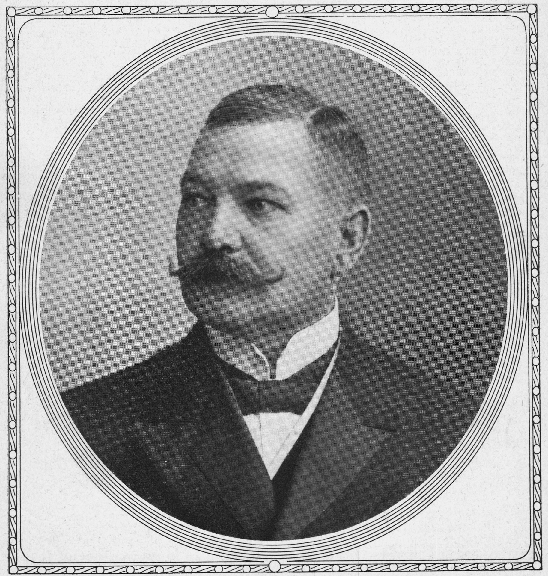 Herman Rydin (1861-1930) på omslaget av Hvar 8 Dag 1911.